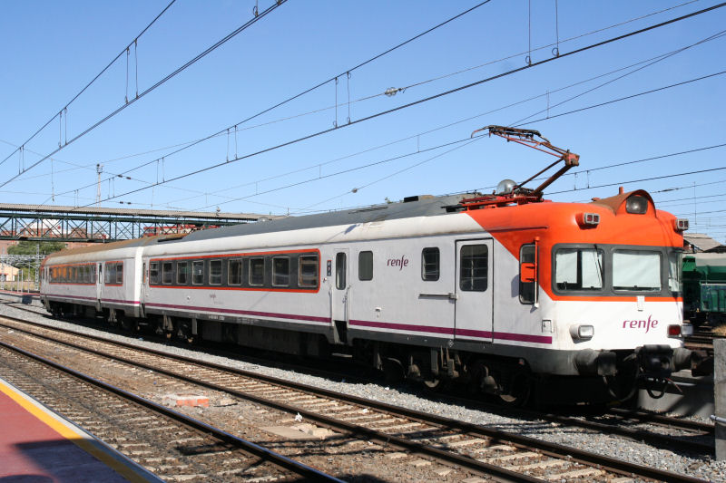 Unidad 432.018 de Renfe. Valladolid (provincia de Valladolid, Castilla y León).